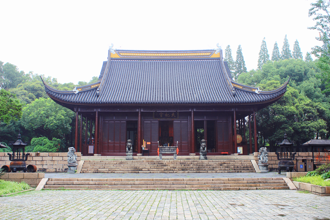 原位于河南路桥西侧，1980年代迁址松江方塔公园内